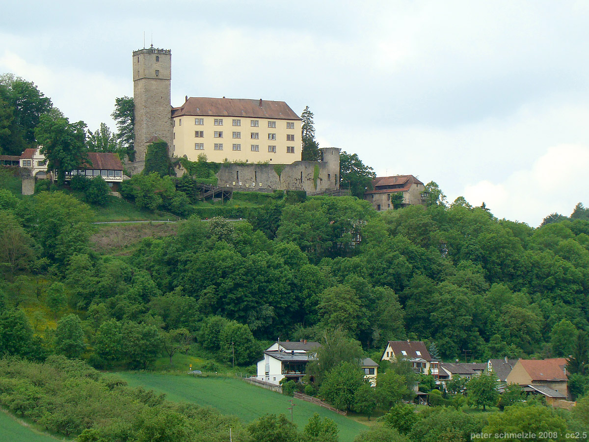 Burg Guttenberg in Haßmersheim-Neckarmühlbach